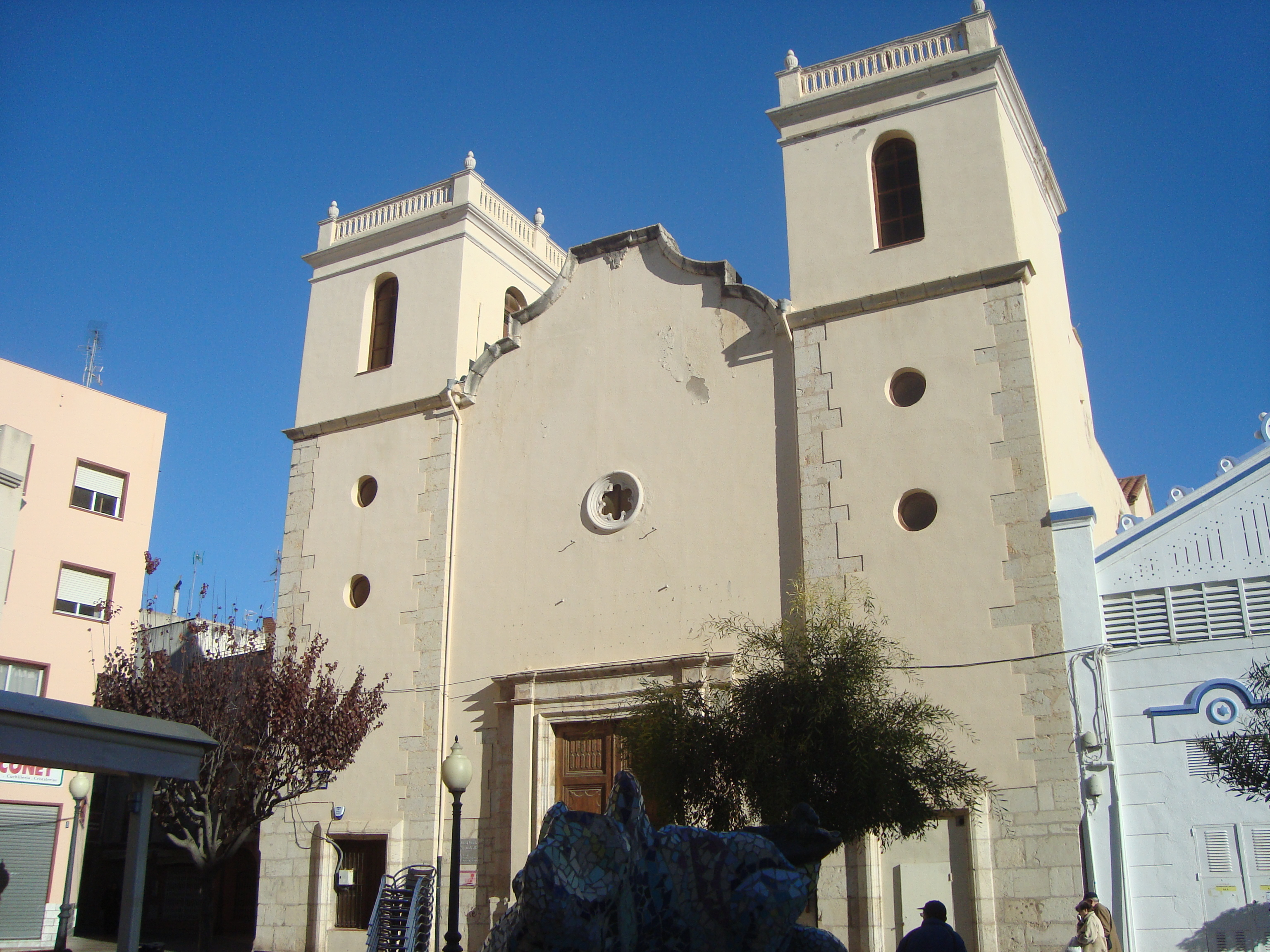 Antiga església parroquial de Sant Agustí bisbe (Vinaròs) 03.138-001.